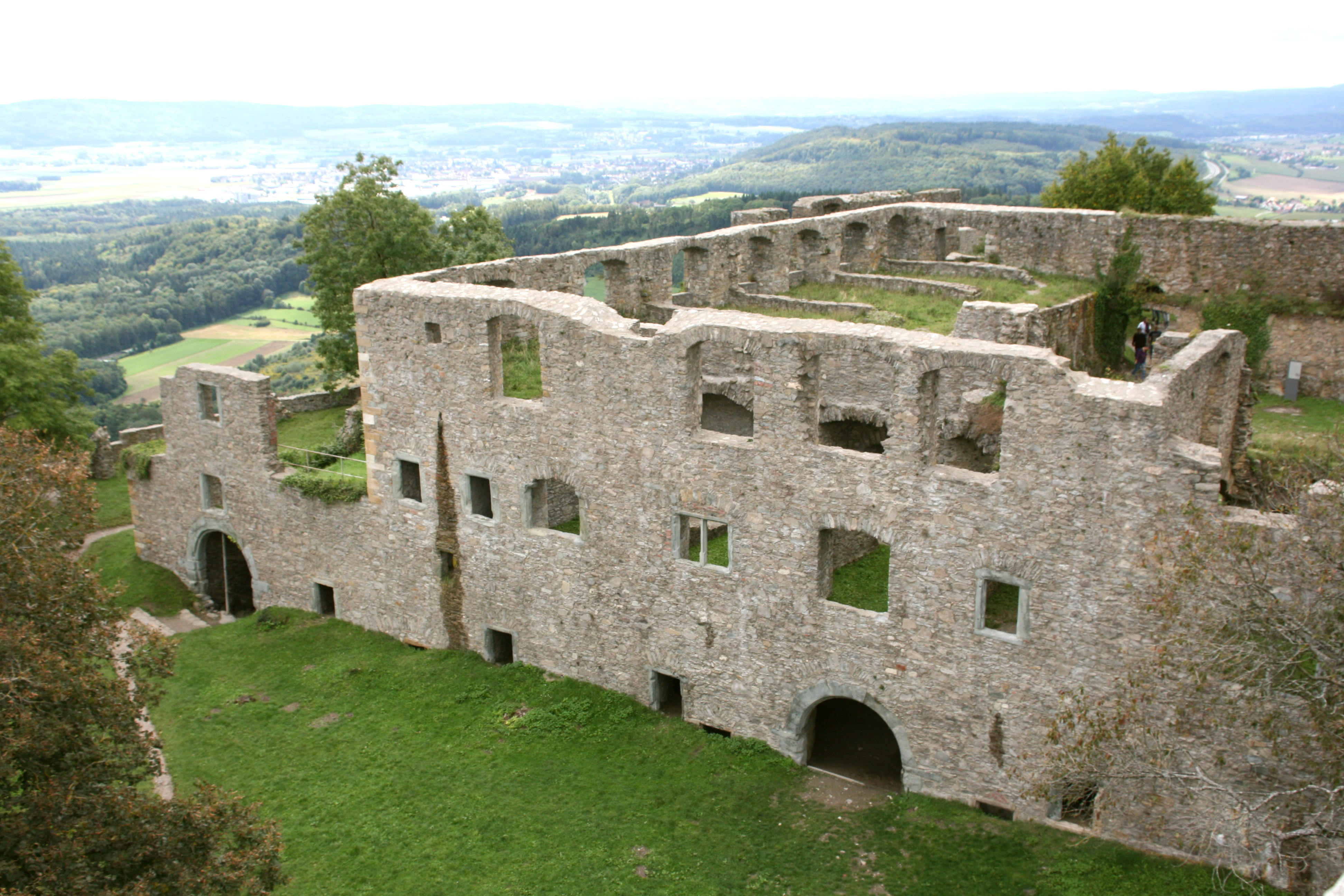 Blick vom Kirchturm zur Fürstenburg der Festung Hohenkrähen in Singen (Hohentwiel)